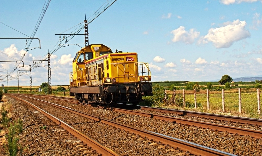 La BB 69000 de Infra torna aïllada de Narbonne, després de passar hores abans amb un tren de treball. Una salutació a Albert , Aleix , Juanjo i Sergio , per la jornada ferroviària que vam gaudir. La BB 69000 de Infra regresa aislada de Narbonne, después de pasar horas antes con un tren de trabajos. Un saludo a Albert , Aleix , Juanjo y Sergio , por la jornada ferroviaria que pasamos.